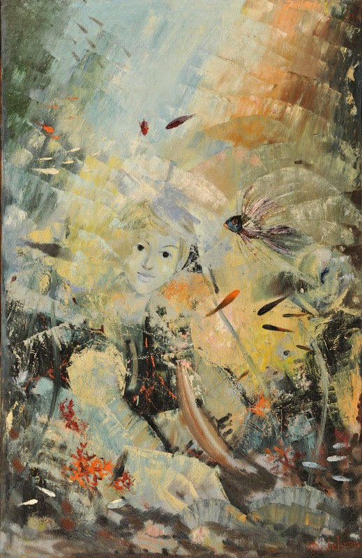 Óleo del 1958 titulado "La Dama de los Mares" pintado por Antonio Dominguez de haro